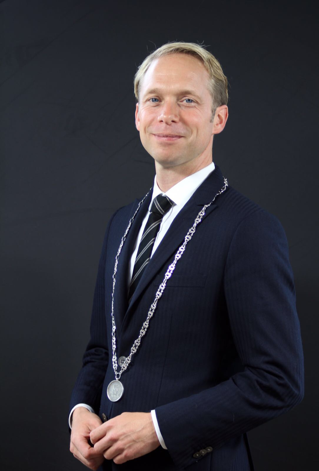 Gerdo van Grootheest